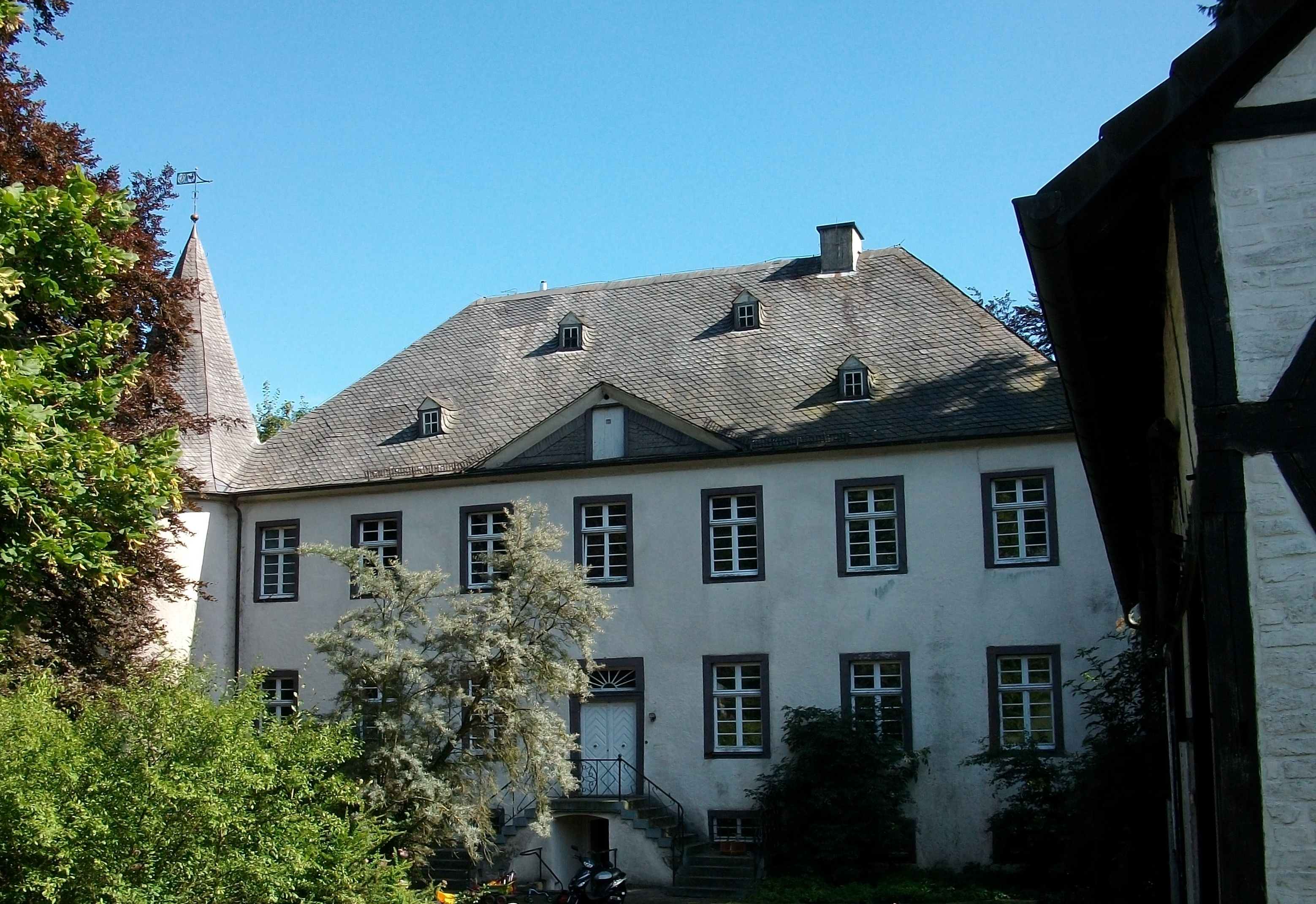 Schloss Obersalwey, Eslohe (Germany)